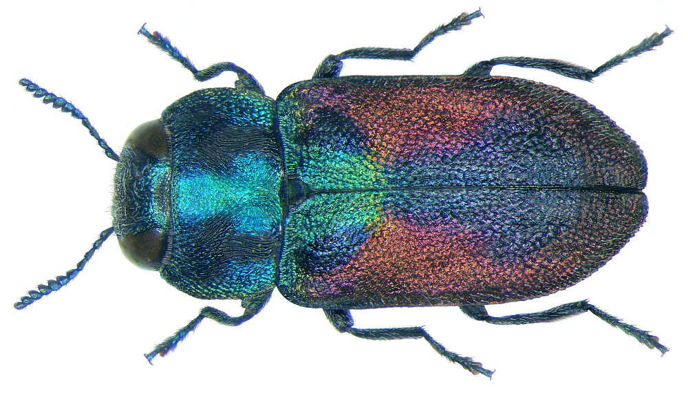 Familie: Buprestidae Grösse: 5,6 mm Fundort: Türkei, Prov. Antalya, Mahmutlar, 1100 m leg. A.Skale, 2006; det. M.Niehuis, 2008 Foto: U.Schmidt, 2008